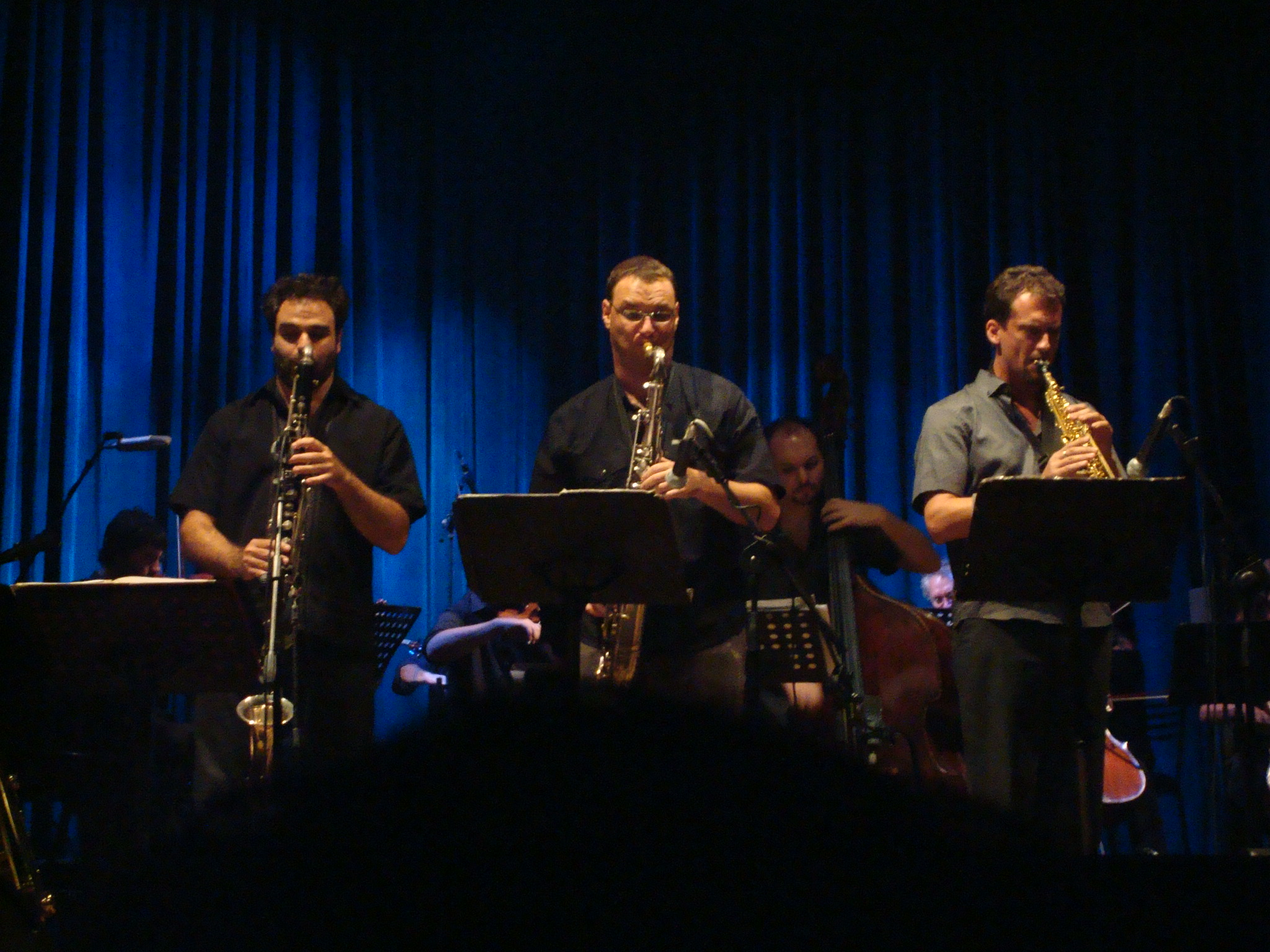 Escalandrum en el Teatro El Círculo, Rosario